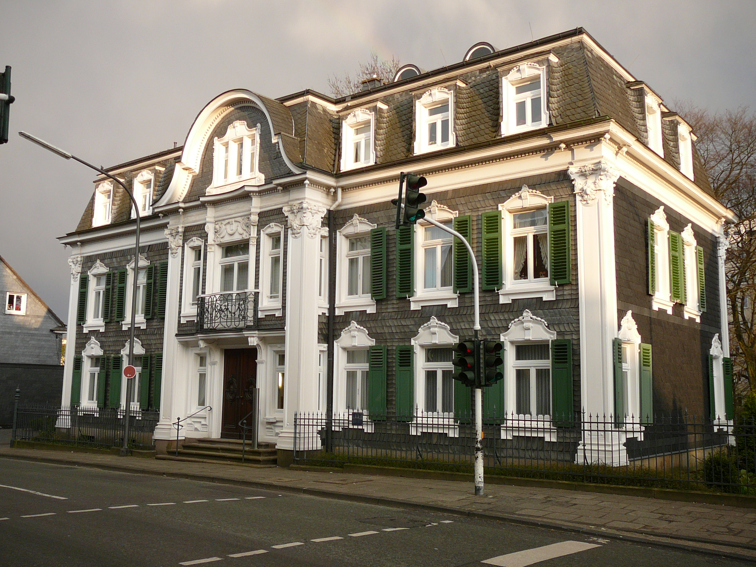 Am Diek, Wuppertal/Oberbarmen